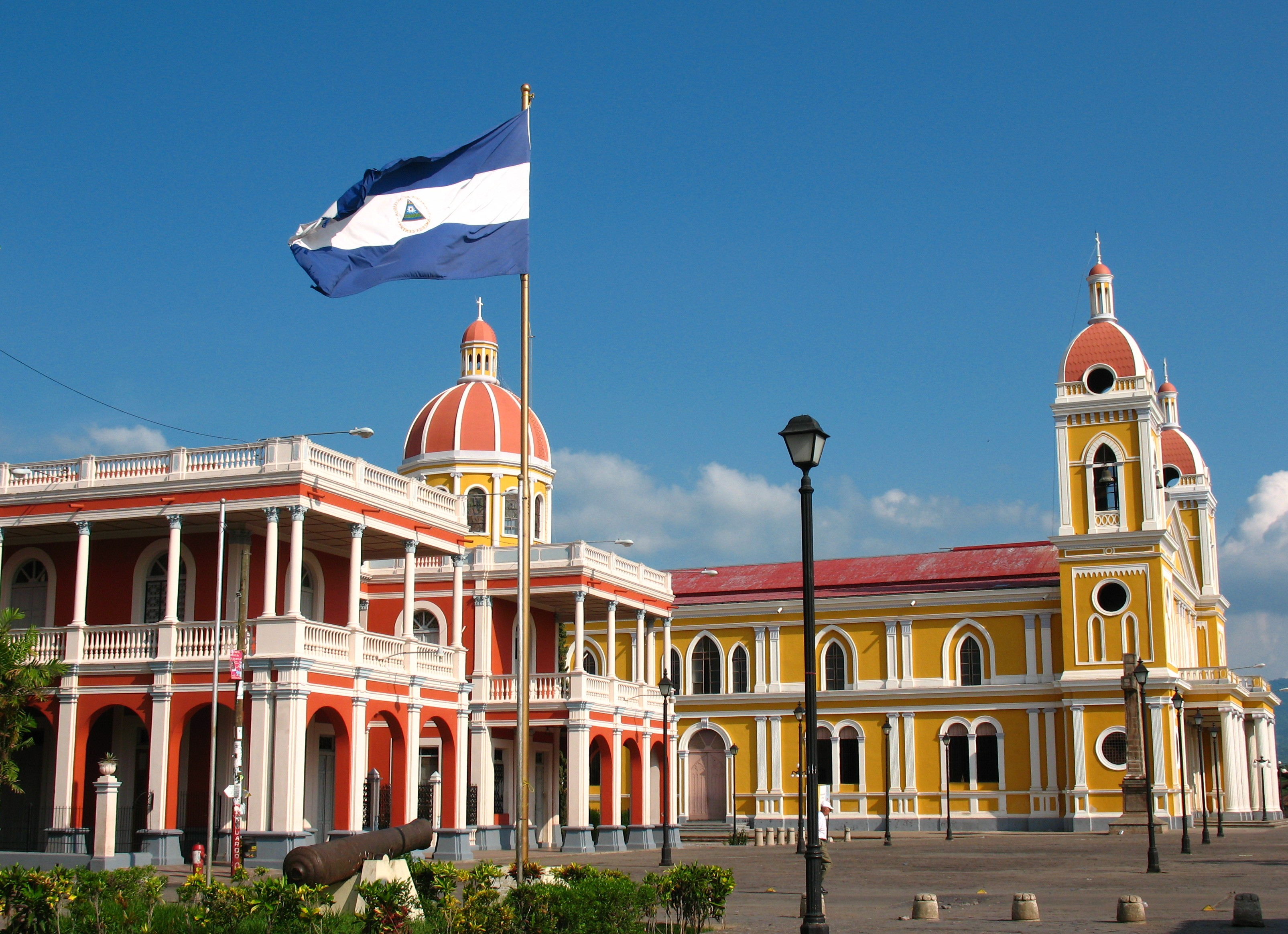 Plaza de la independencia en la ciudad de Granada (Nicaragua)